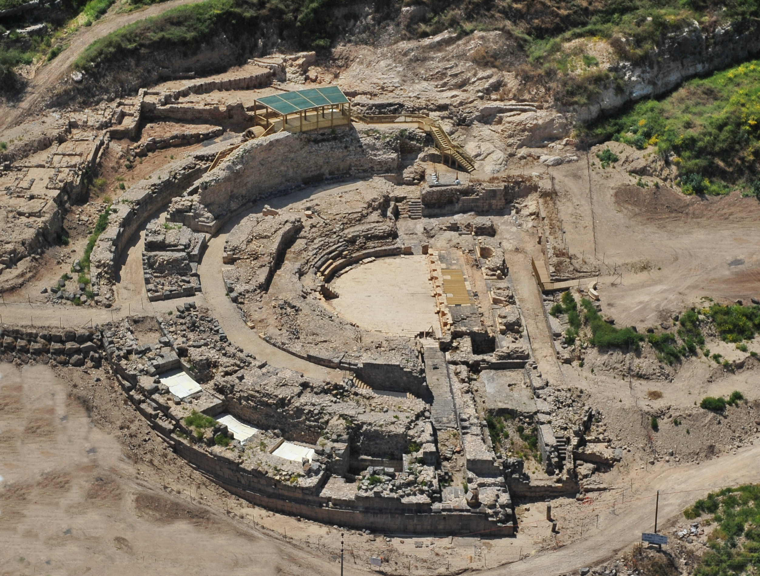 טְבֶרְיָה נוסדה בשנת 20 לספירה על ידי הורדוס אנטיפס ונקראה על שמו של הקיסר הרומי טיבריוס. על פי הברית החדשה, לאחר הקמת העיר פעל ישו באזור צפון הכנרת, ועל כן בנצרות נחשב האזור לקדוש. בטבריה ובסביבותיה קמו כנסיות רבות, והעיר הפכה למרכז לצליינות. בהיסטוריה היהודית, טבריה נחשבת לאחת מארבע ערי הקודש.